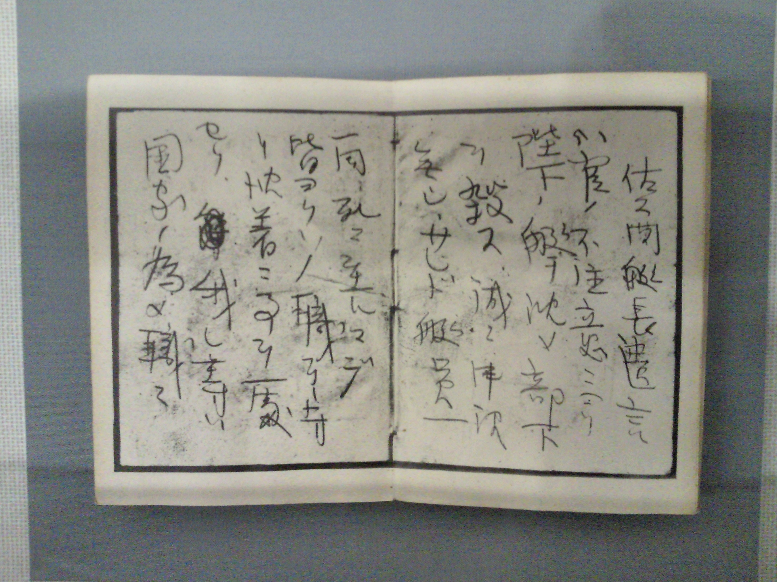 佐久間勉艇長の遺書（水交社より写真版で出版されたもの）